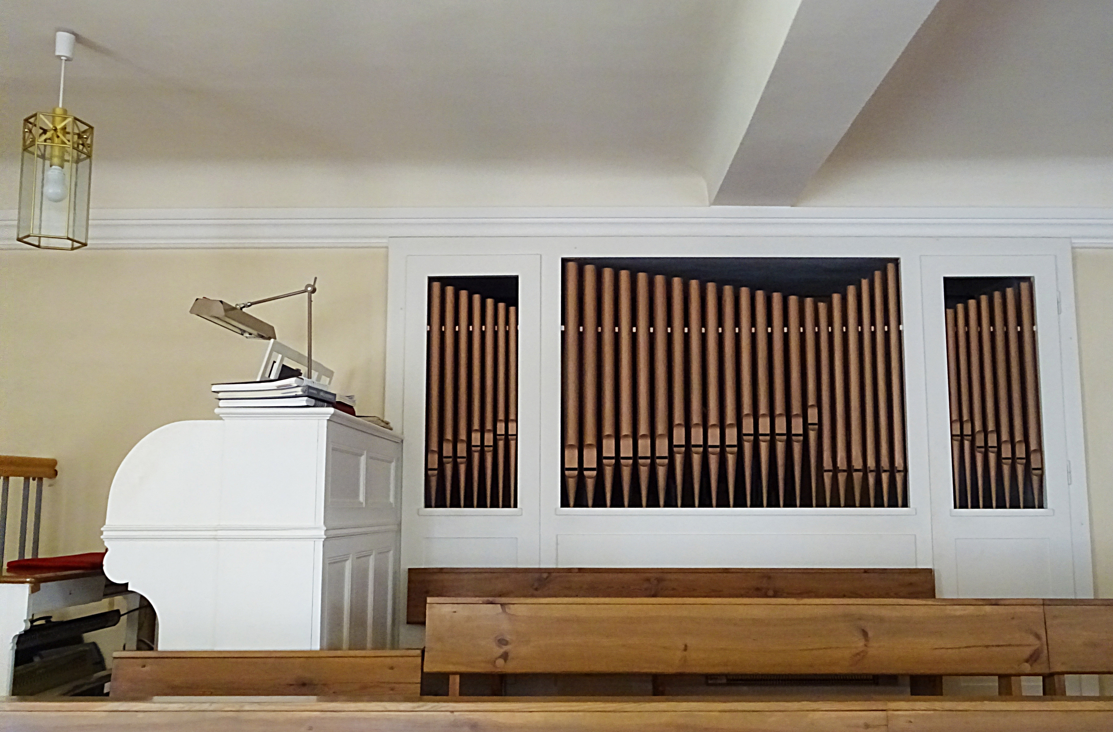 Orgel von Anton Feith (1910, II/P14) in der Dorfkirche St. Leonhard (Birkenfelde)